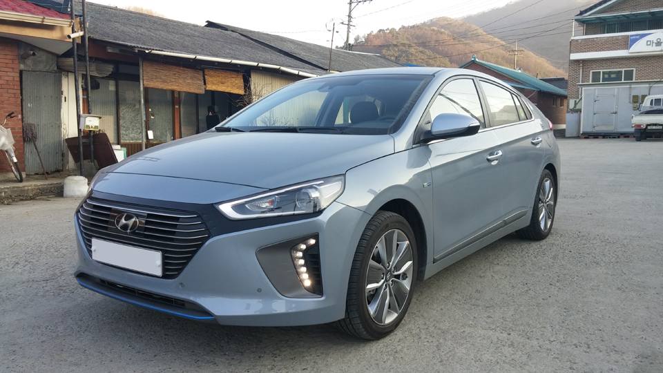 현대 아이오닉 정측면